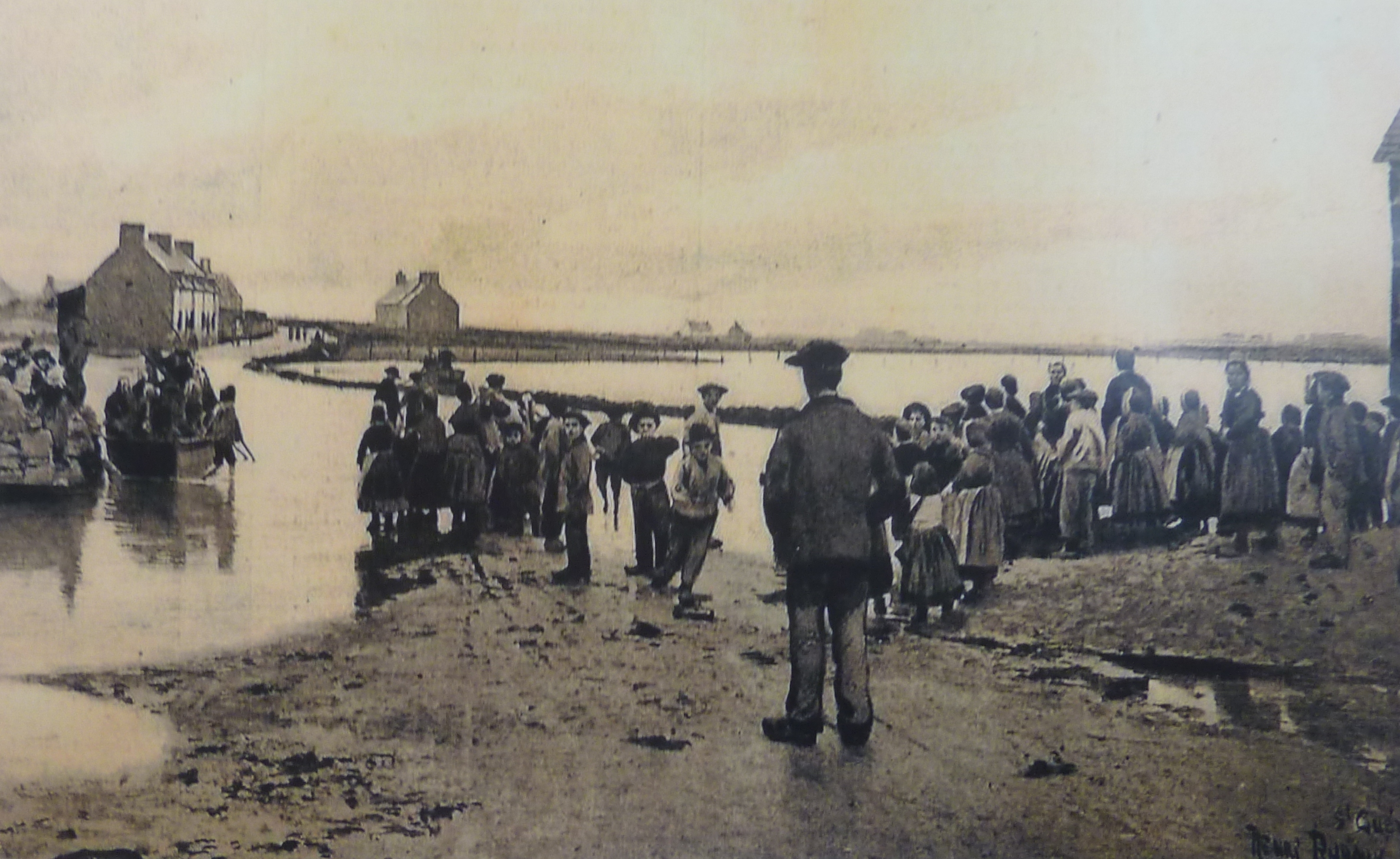 Saint-Guénolé-Penmarch : le raz de marée de la nuit du 1 au 2 février 1904 (photographe inconnu)